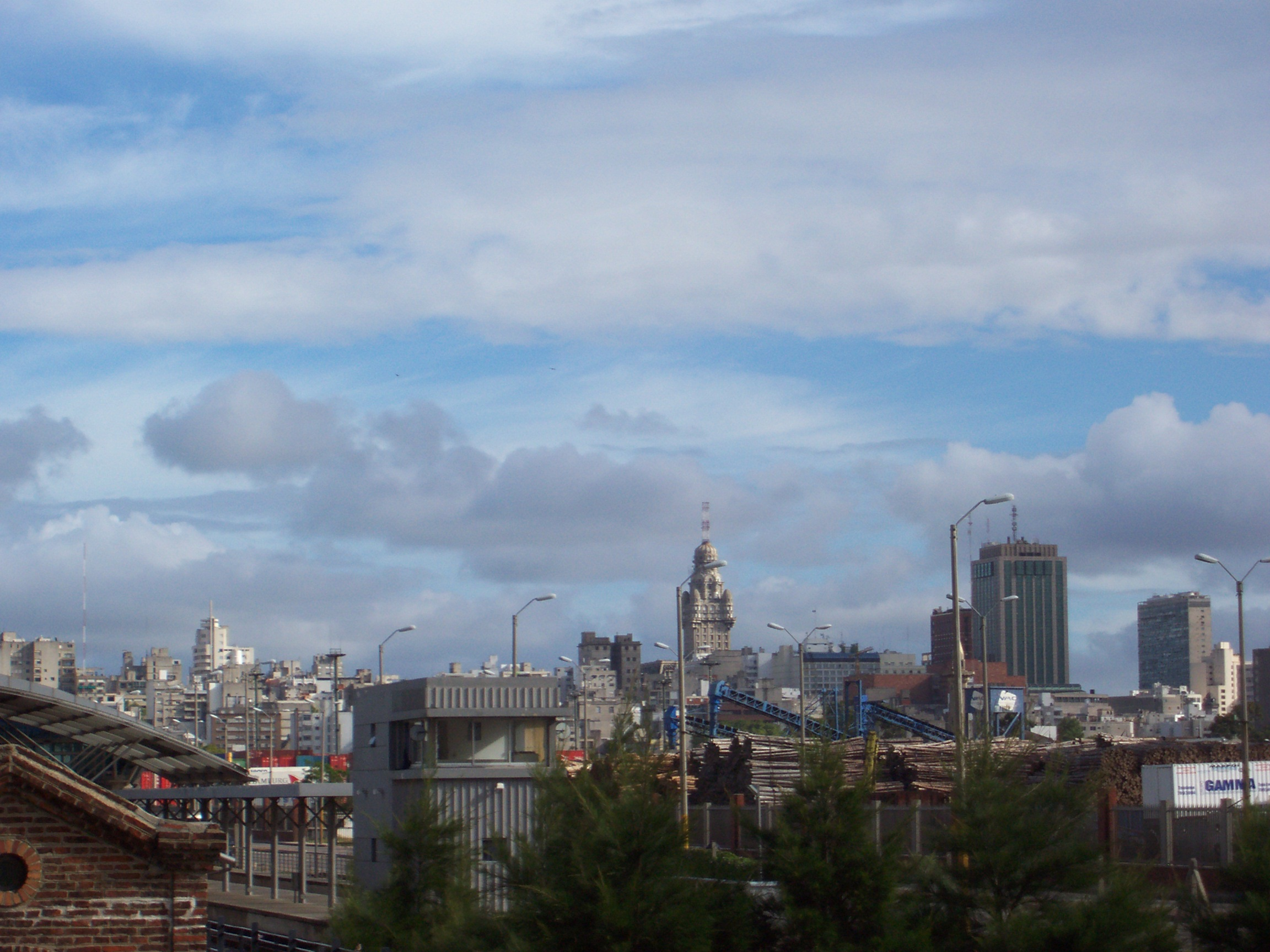 Vista del centro de Montevideo desde el complejo de la planta baja de la Torre de las Telecomunicaciones. Federico Corral aka Shant En el centro de la fotografia se ve el Palacio Salvo, construido en 1925, se transformo en el primer rascacielos del Uruguay, y el edificio mas alto de latinoamerica.